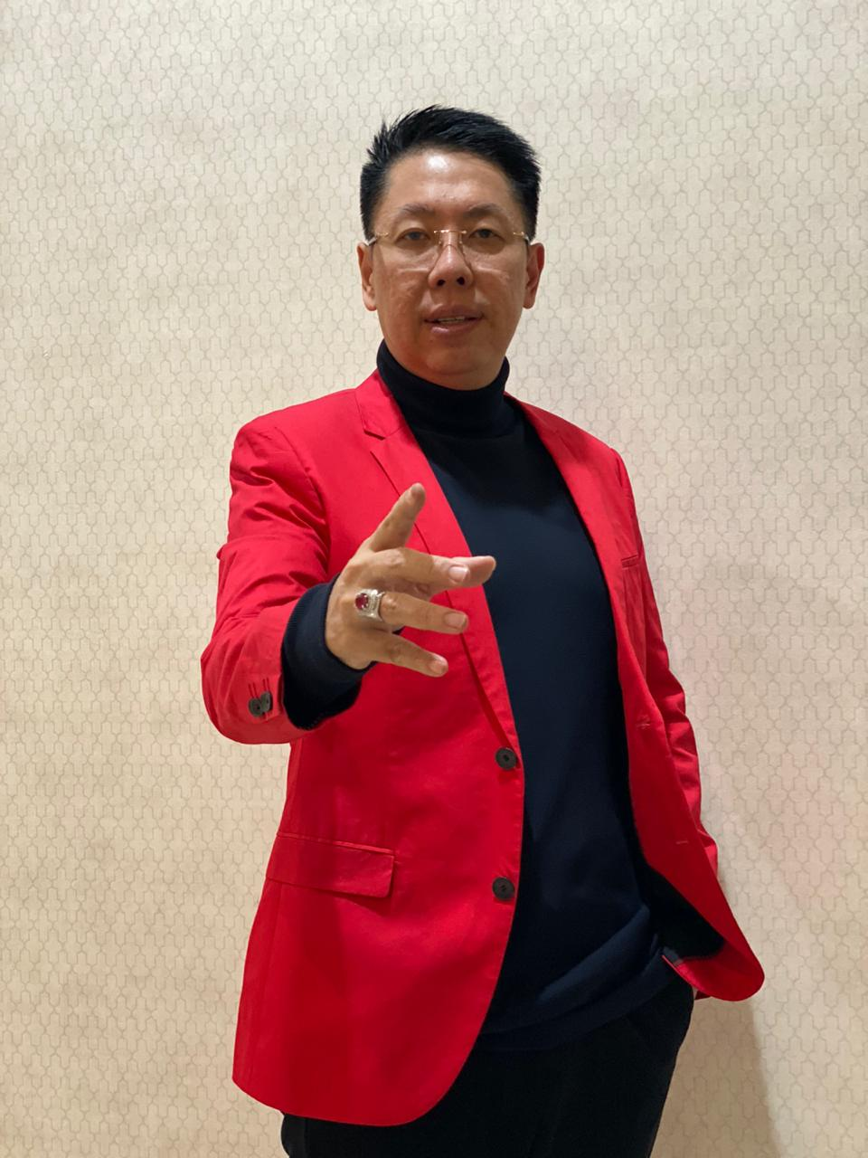 Henry Indraguna